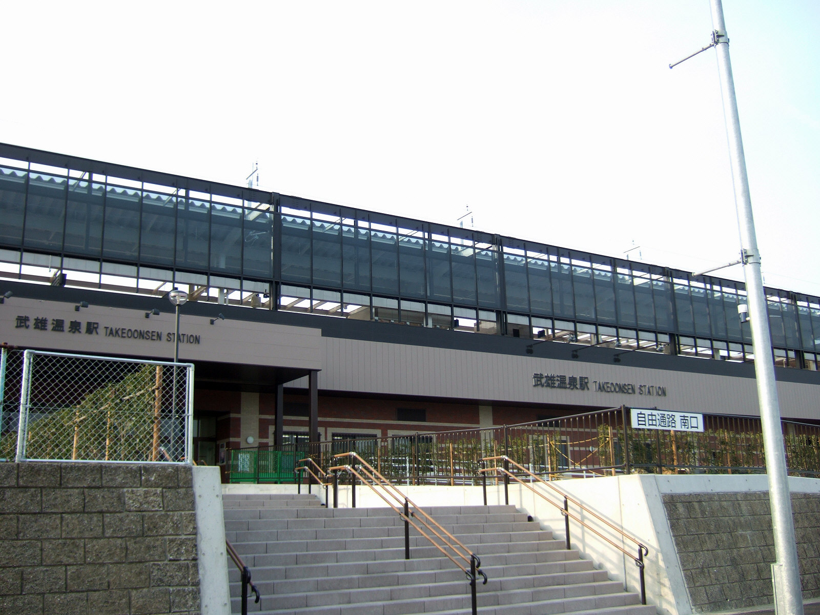 JR武雄温泉駅御船山口（南口）駅舎 JR Takeoonsen Station